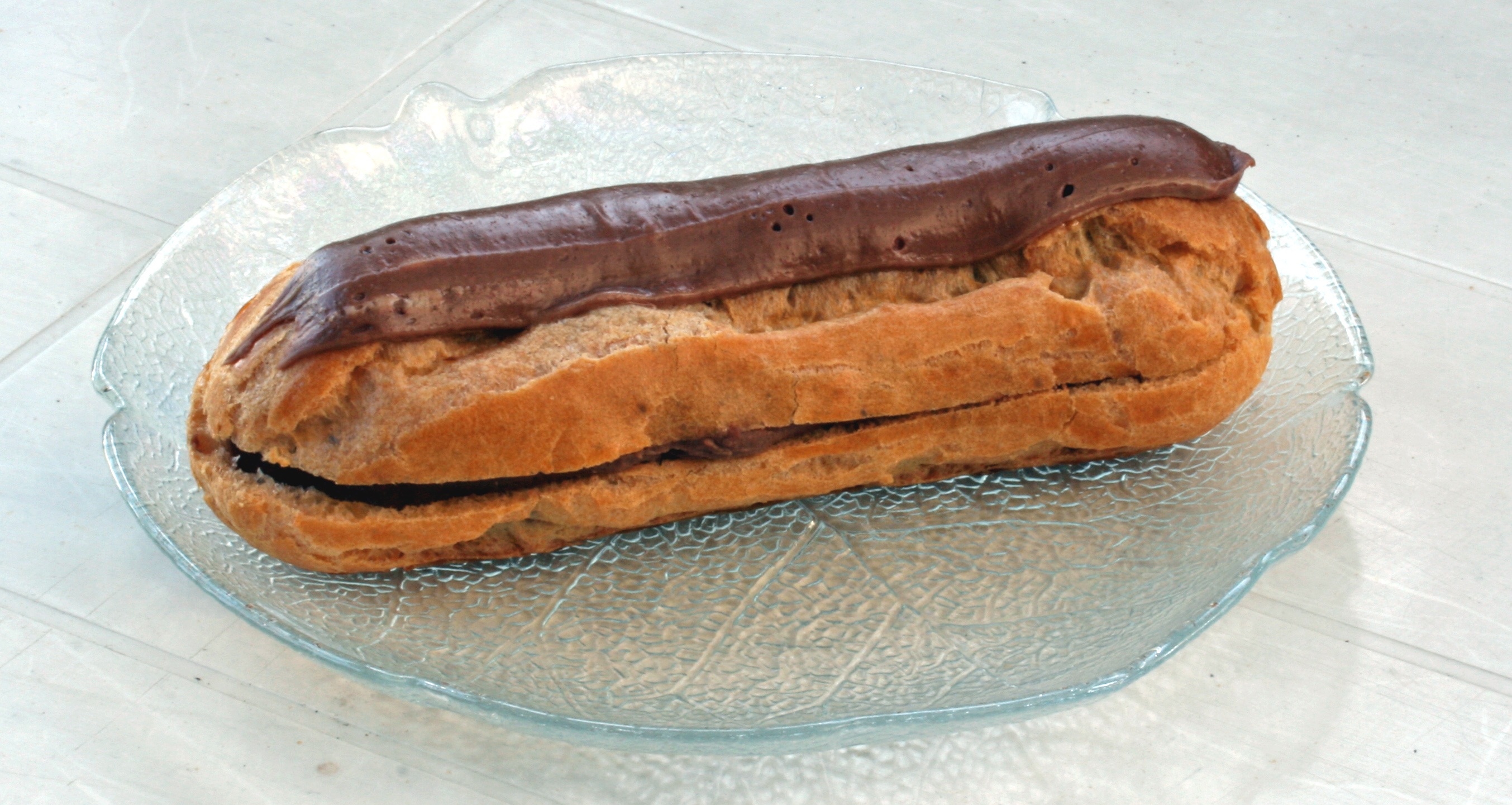 Éclair.